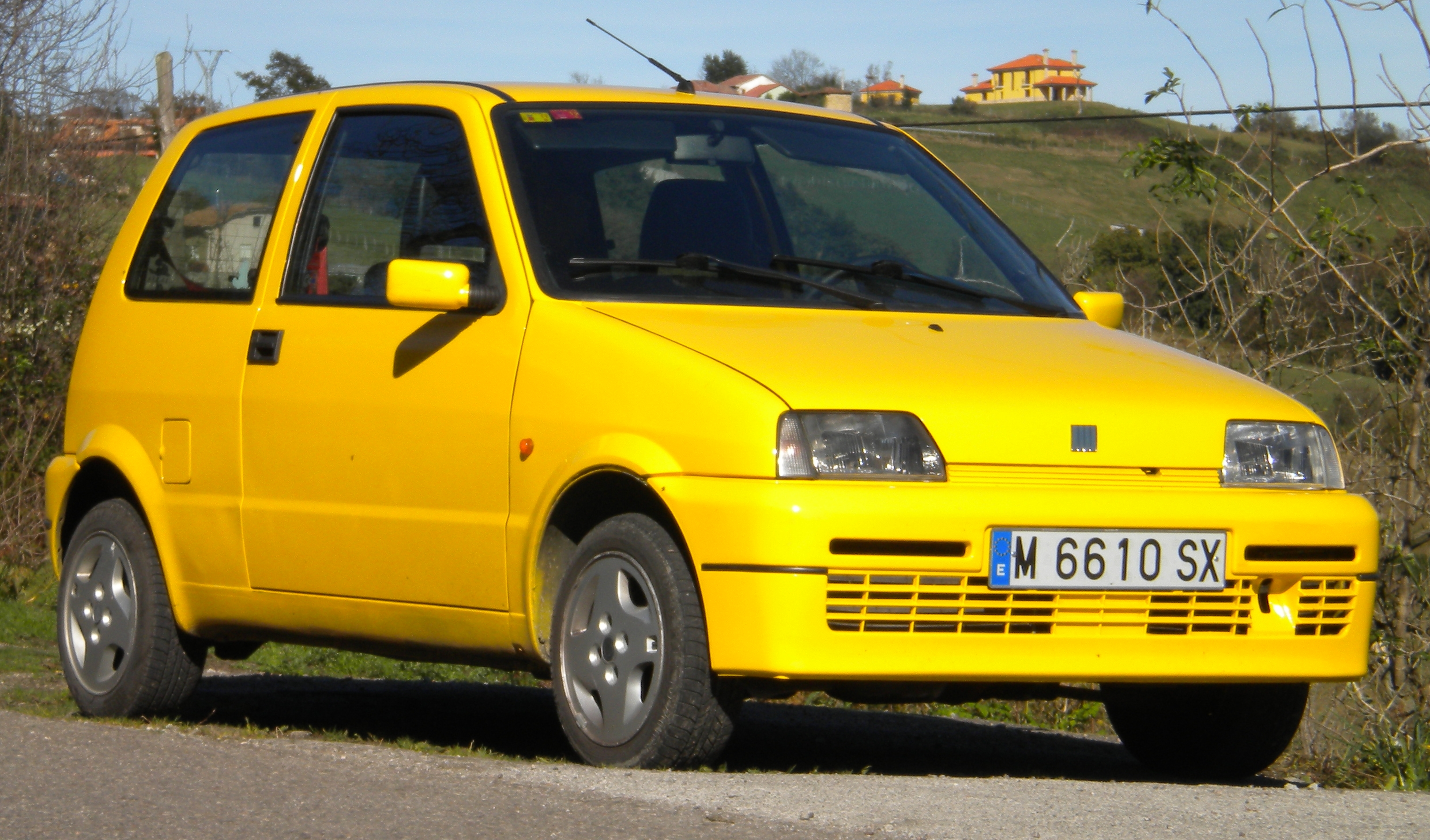 Fiat Cinquecento Sporting 1.1